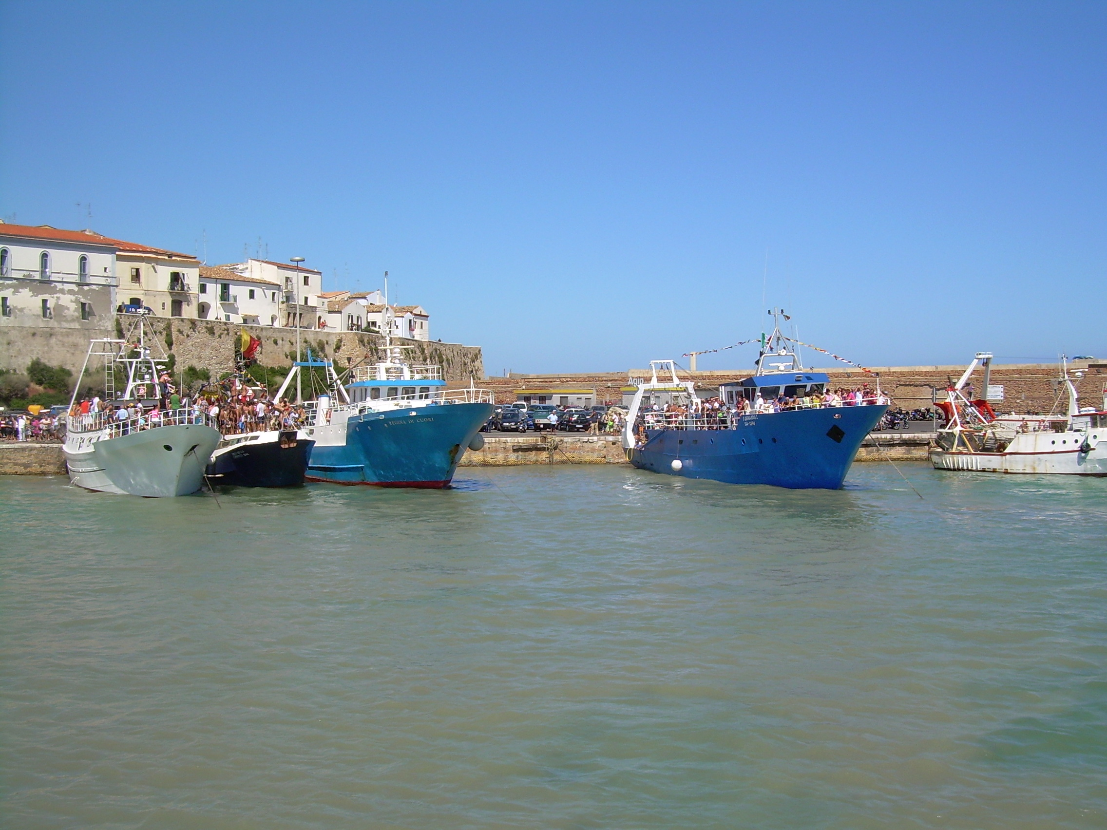 Foto realizzata da me medesimo. --Elpìs 09:51, 4 ago 2006 (CEST) Rappresenta il porto della città di Termoli visto dal mare.